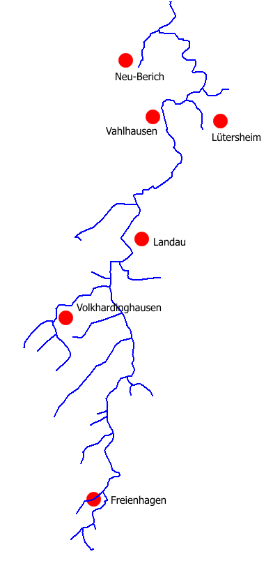 Furkation der Watter